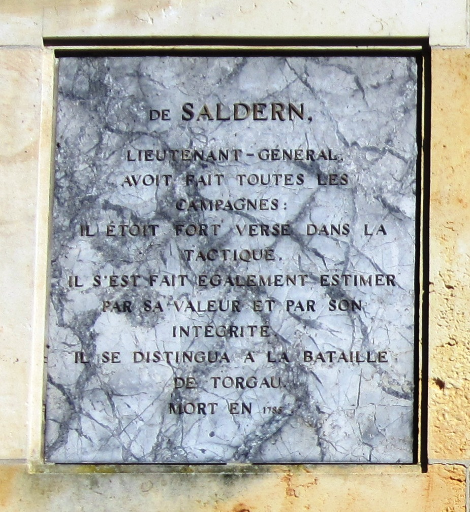 Gedenktafel für Friedrich Christoph von Saldern am Obelisken in Rheinsberg